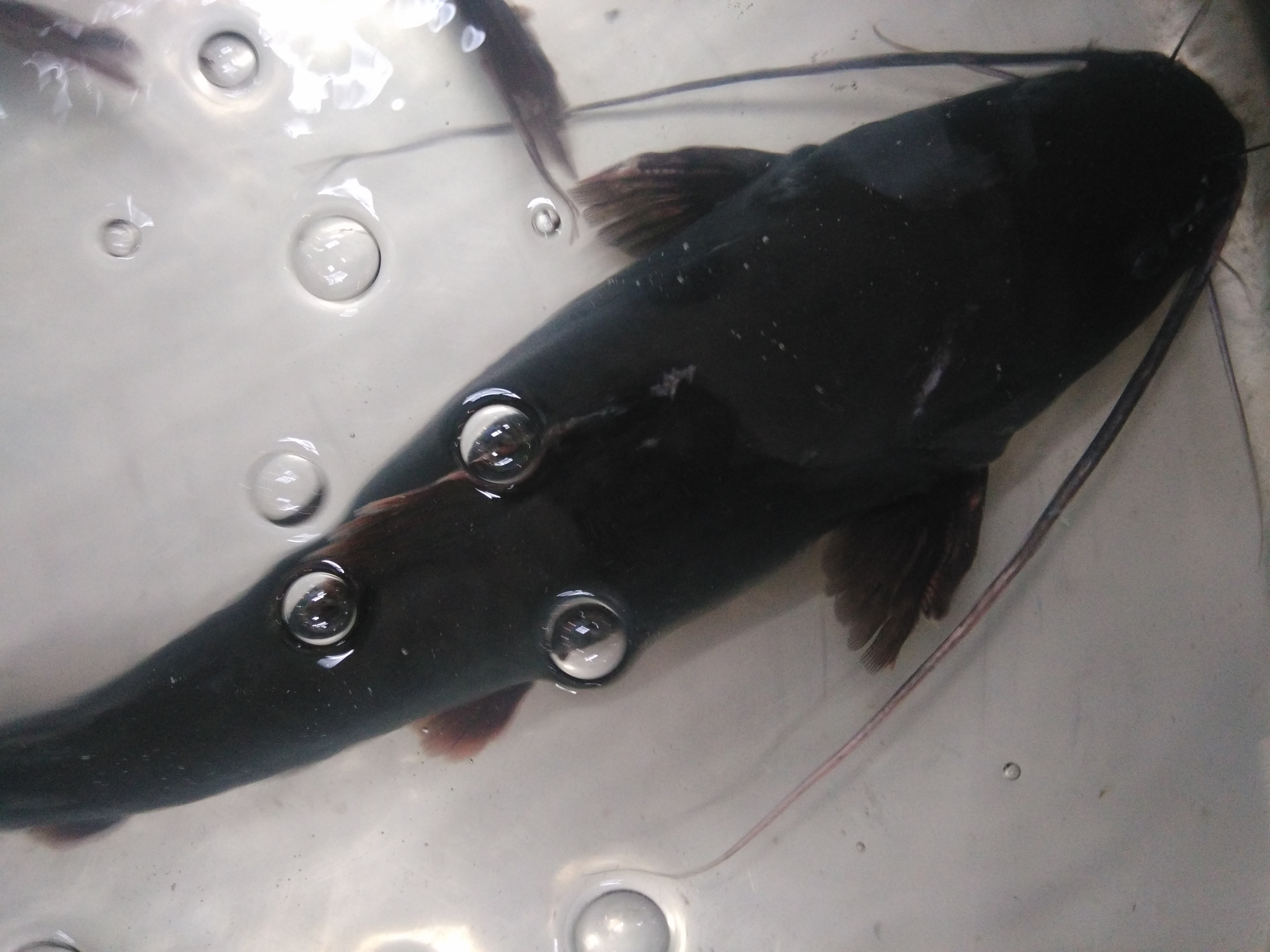 Hình chụp bằng máy điện thoại một con cá hú ở BigC Phú Thạnh